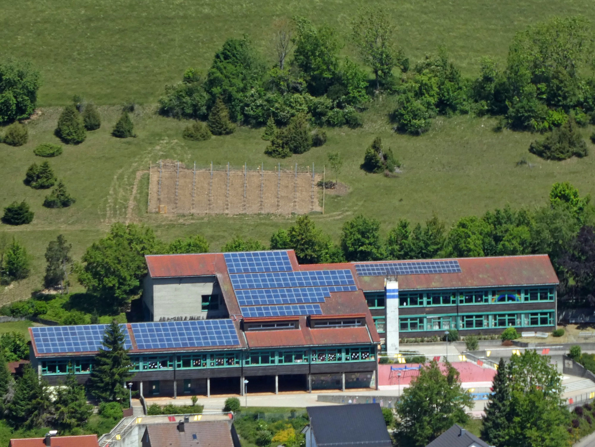 Oberkochen: Weinberg überhalb der Tiersteinschule, 2020 neu angelegt